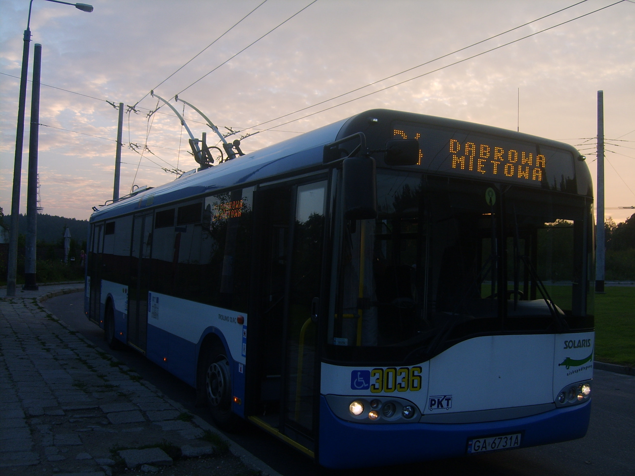 Trolejbus Solaris Trollino 12AC (3036) na pętli Dąbrowa Miętowa w Gdyni.